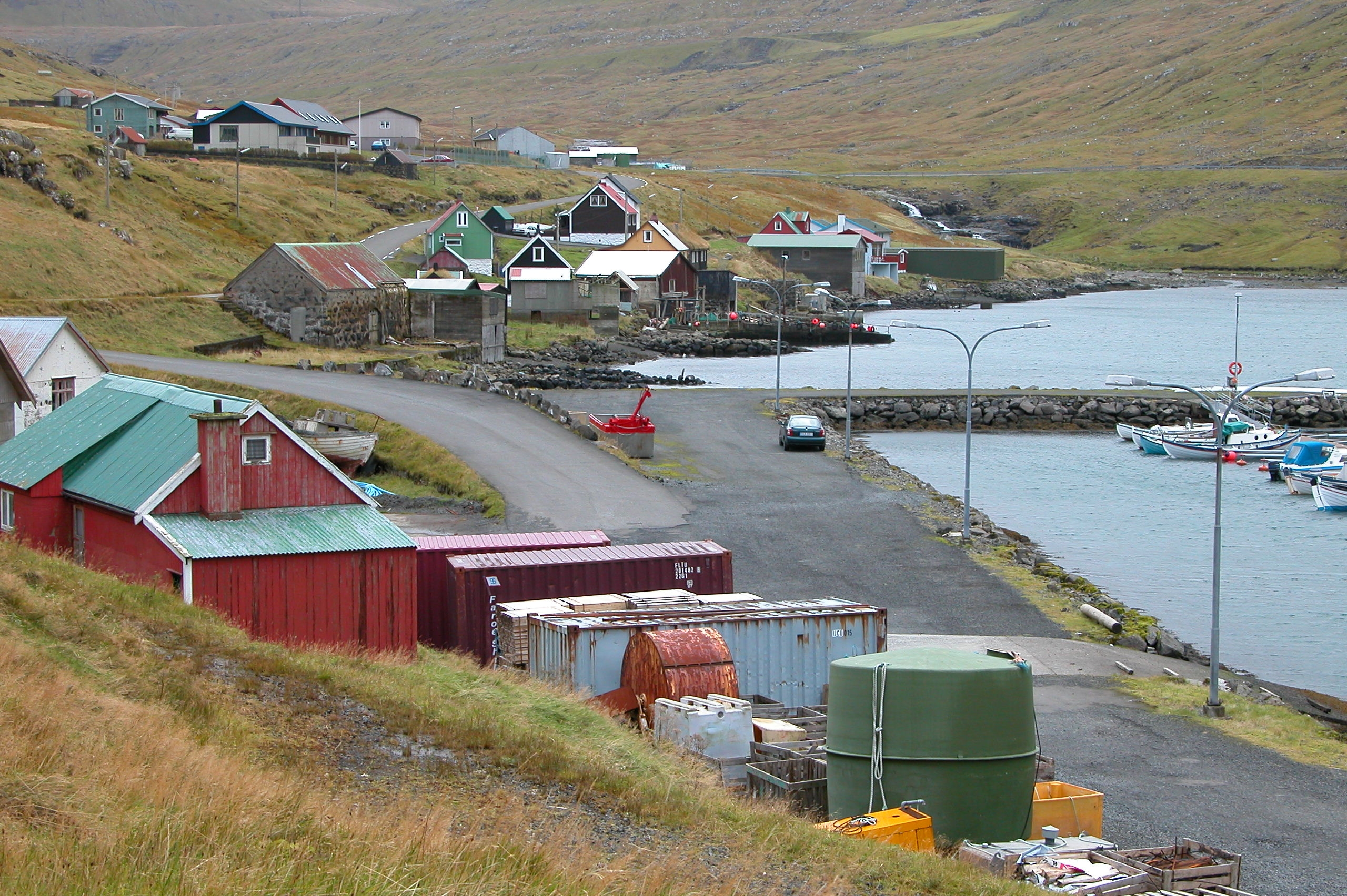 Funningsfjørður, Eysturoy, Faroe Islands.